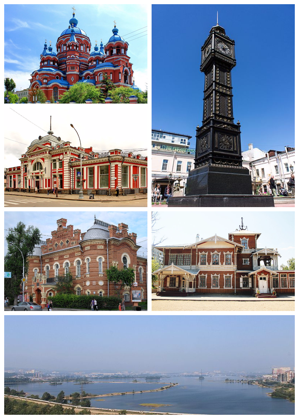 Коллаж для статьи об Иркутске из фотографий